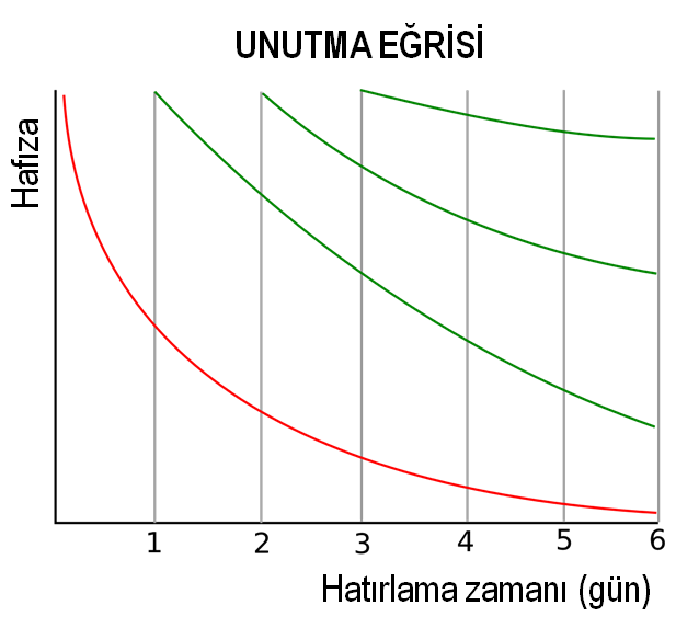 Unutma eğrisinin tipik bir tasviri.